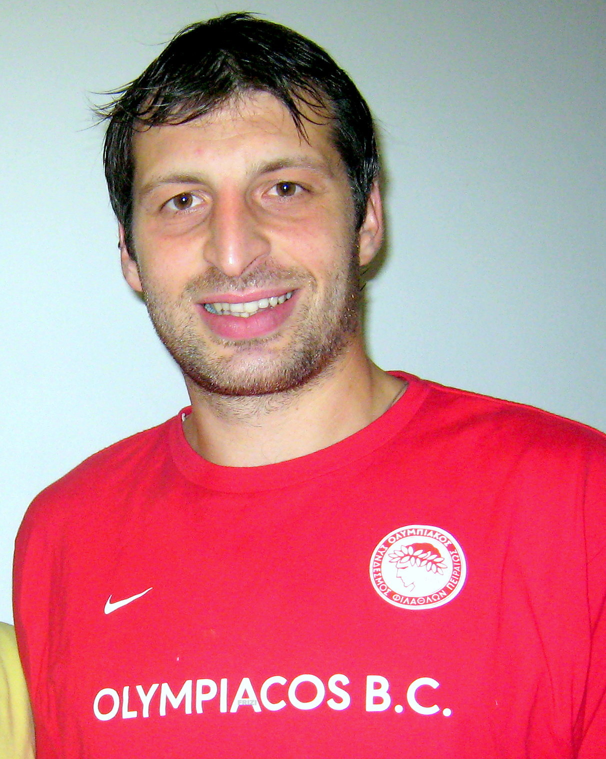 תיאודורוס פאפאלוקאס, צולם במסגרת משחק כדורסל של קבוצת אולימפיאקוס בהיכל נוקיה , יד - אליהו ת"א .